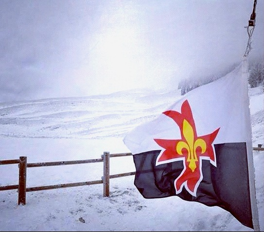 C'est le baussant du camp Raider 2011 des Scouts d'Europe